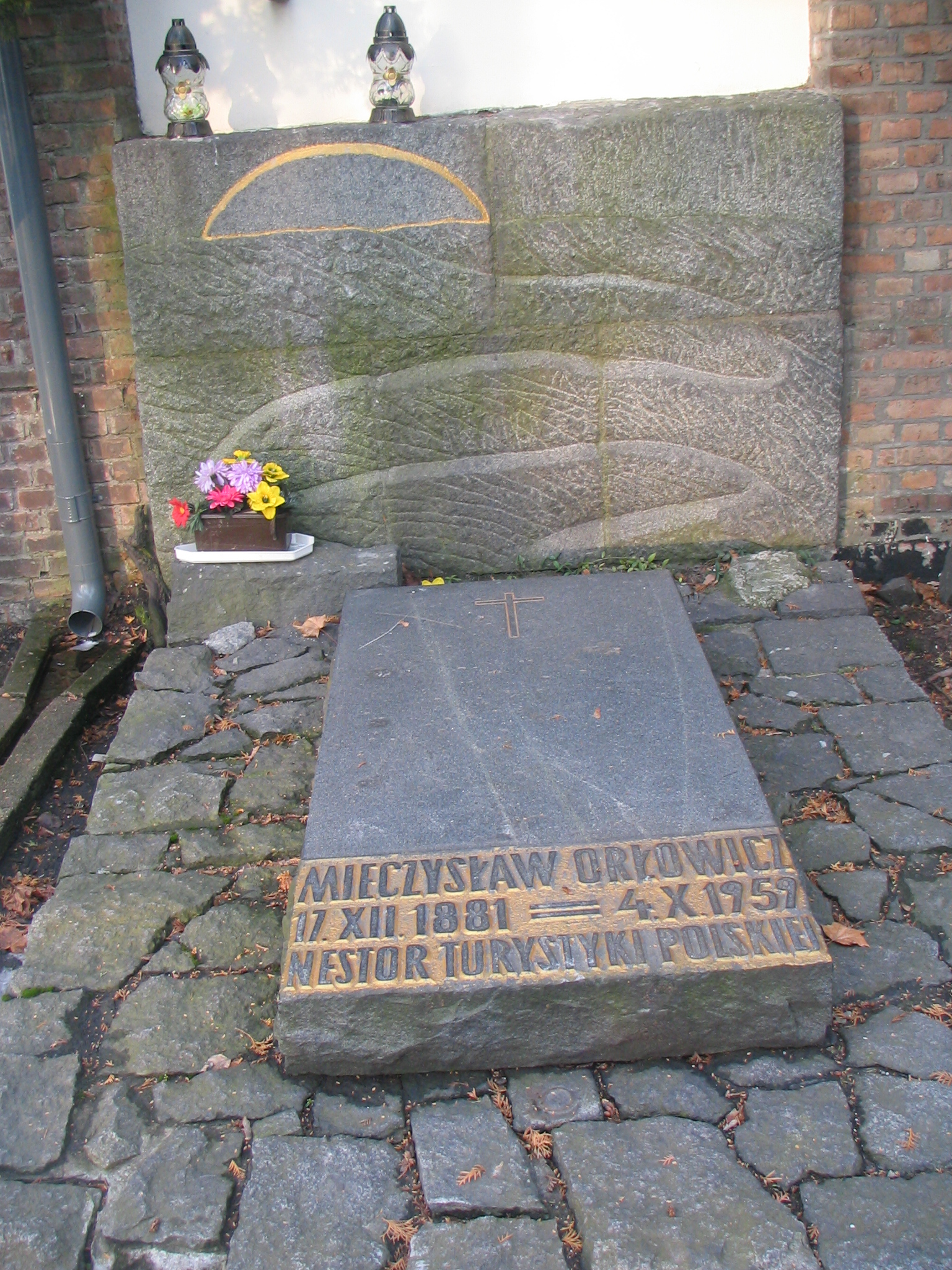 Grave of Mieczyslaw Orlowicz